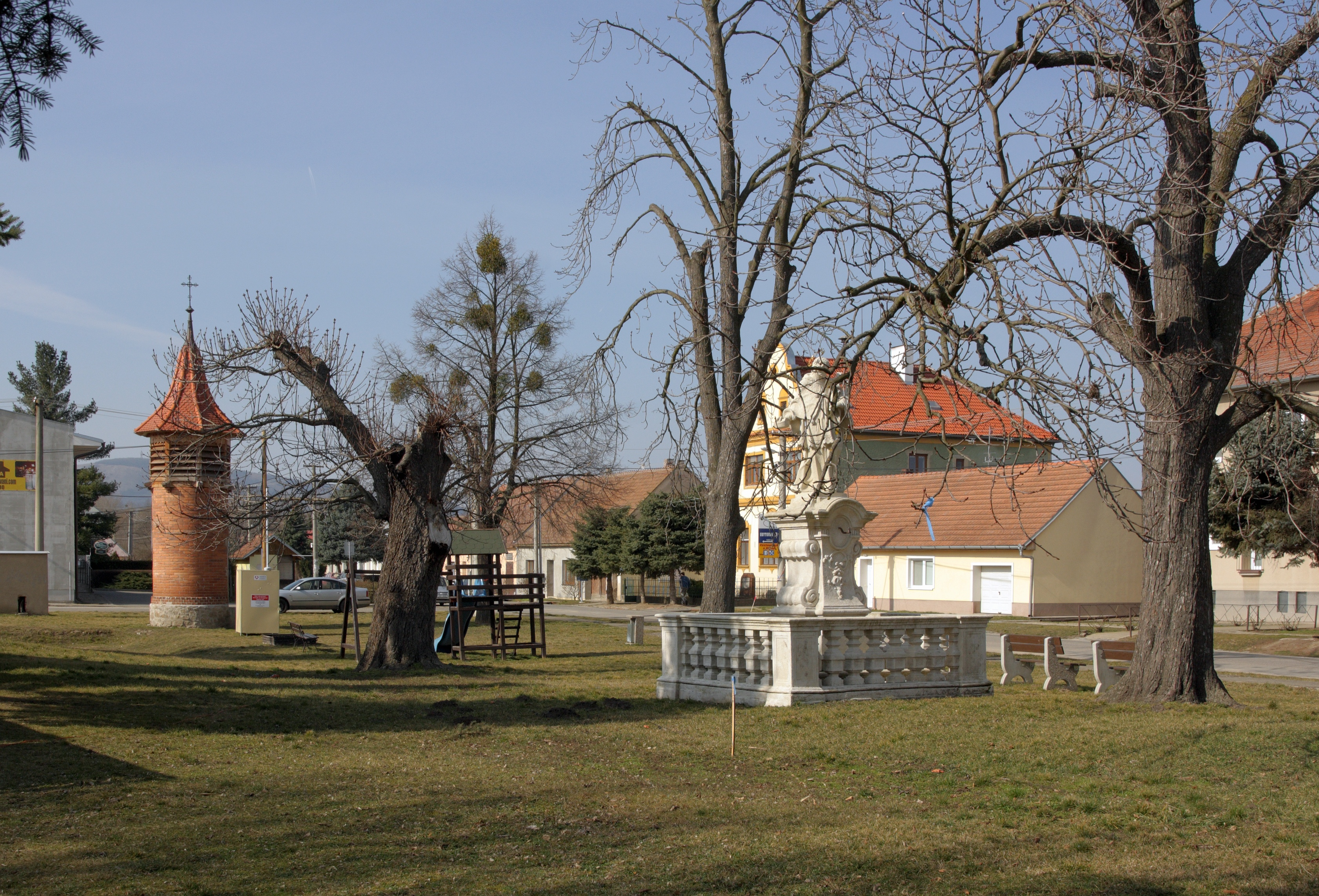 Nové Mlýny - náves.